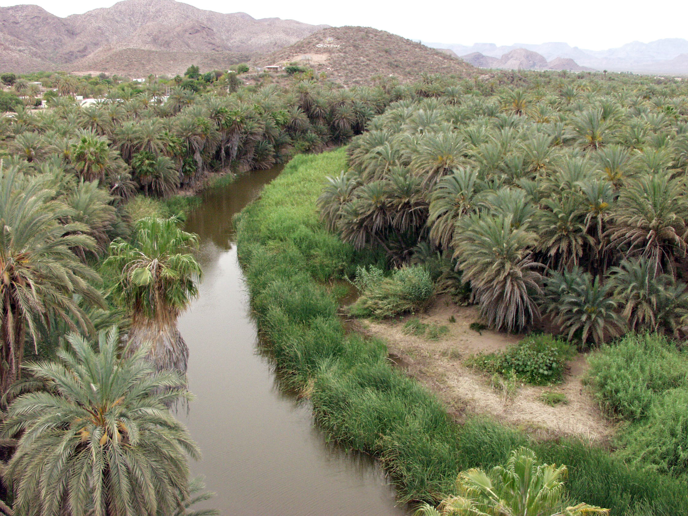 Mulege Oasis, Baja California Sur, Mexico